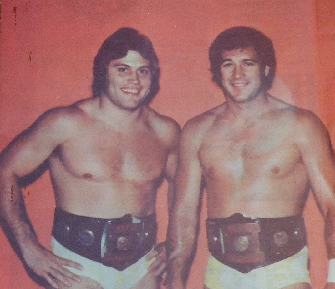 Jim Brunzell and Greg Gagne en couverture du magazine de catch de l'American Wrestling Association n.195 de 1977